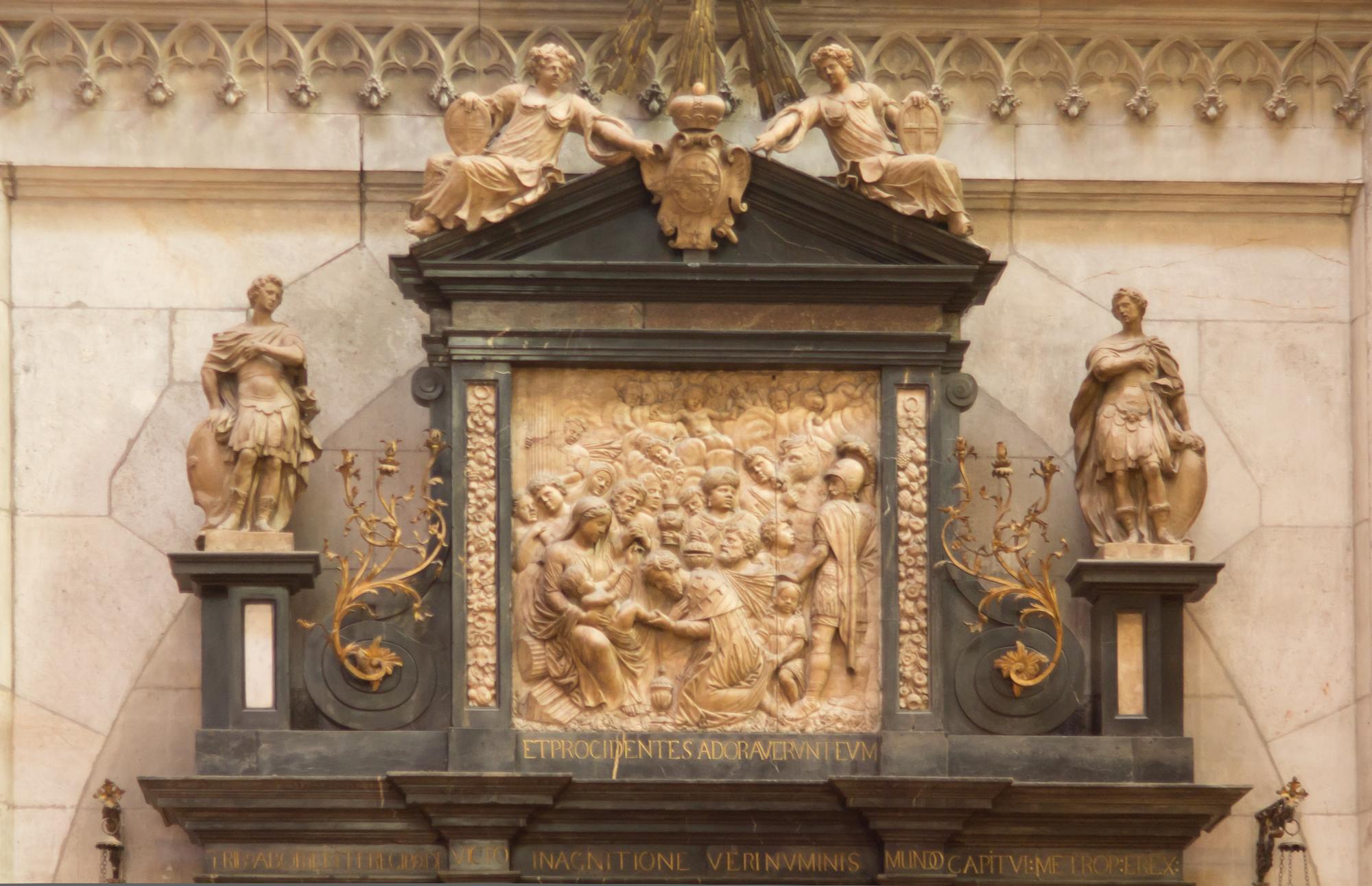 Kölner Dom, ehemaliges barockes Mausoleum für den Dreikönigenschrein, 1889 abgerissen, seit 1920 (verändert) als Altarwand an der Ostseite des Nordquerhauses eingefügt, seit 1963 Altar für die Schmuckmadonna.